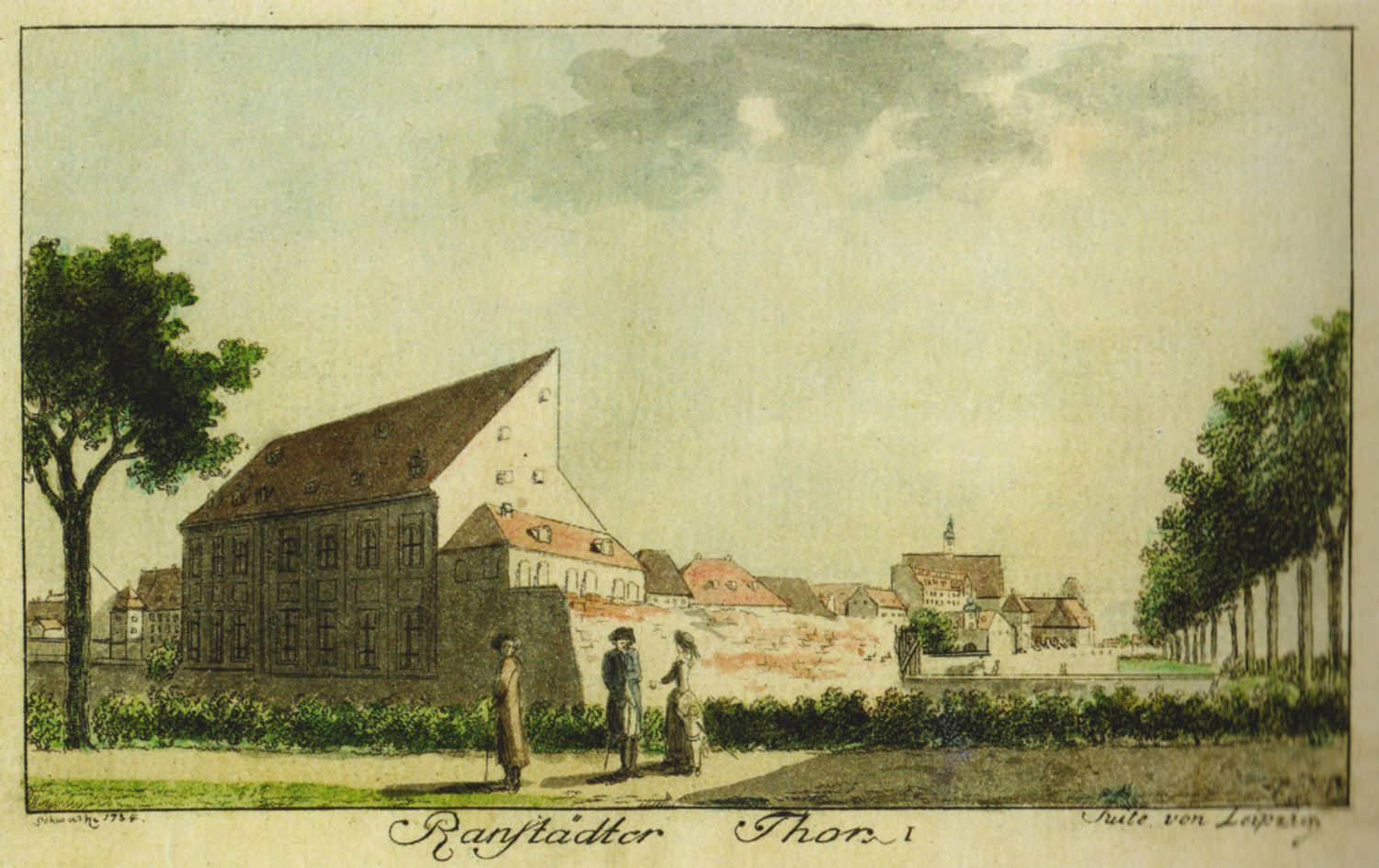 Die Ranstädter Bastei in Leipzig mit dem Komödienhaus, kolorierte Radierung